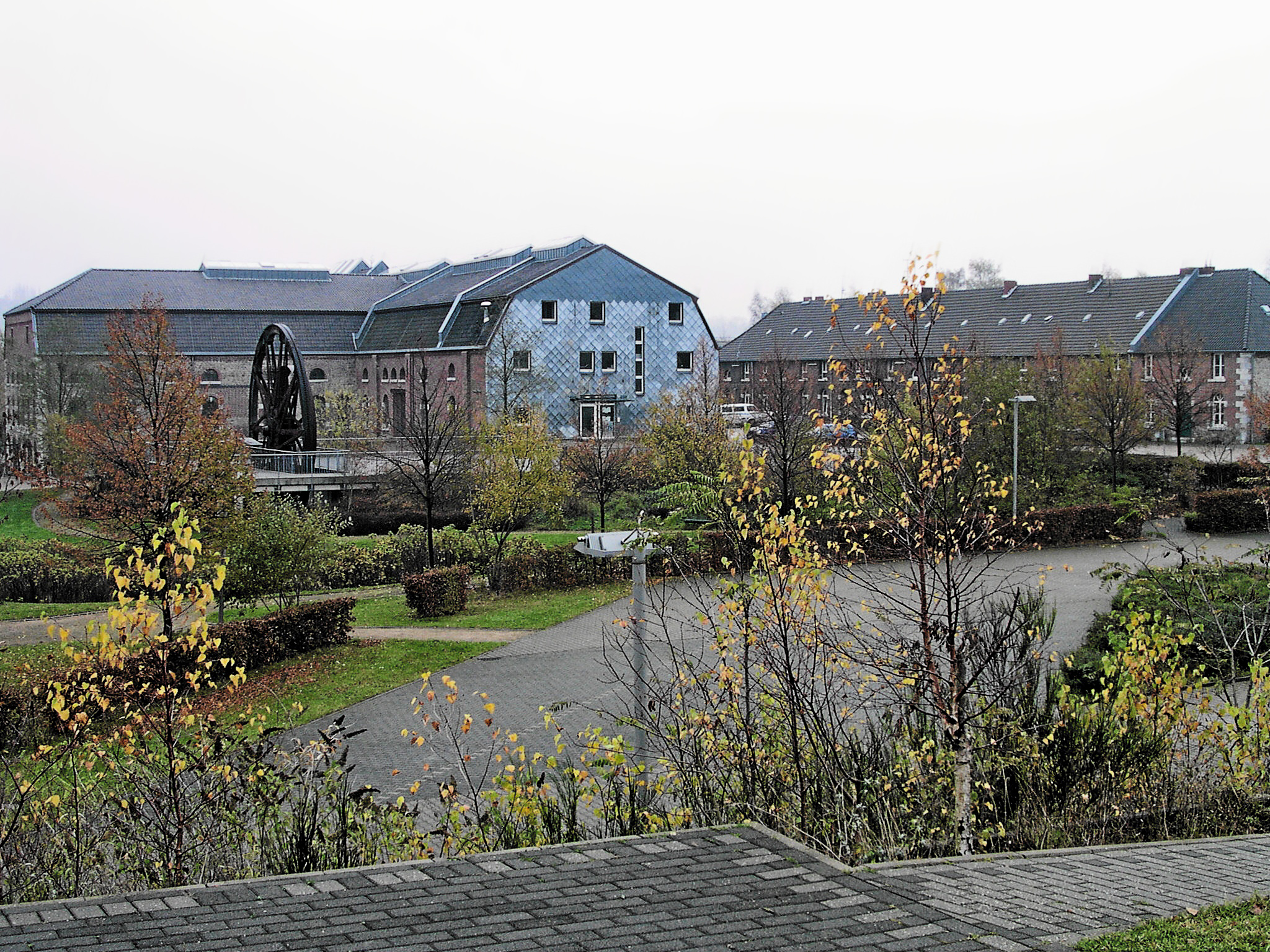 Stolberg, Zinkhütter Hof, Gesamtansicht